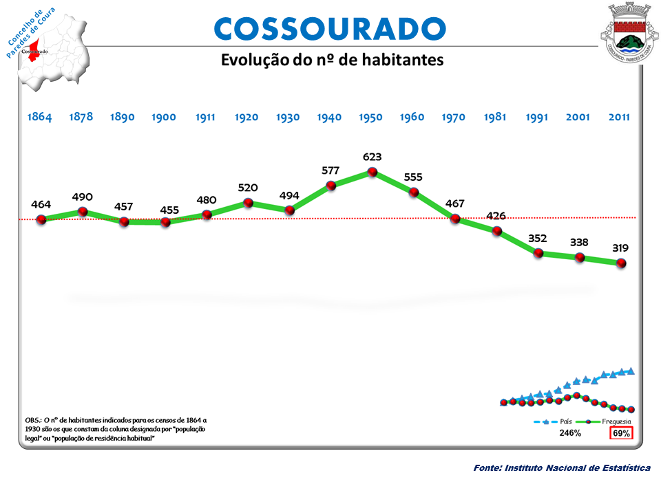 Censos 1864/2011